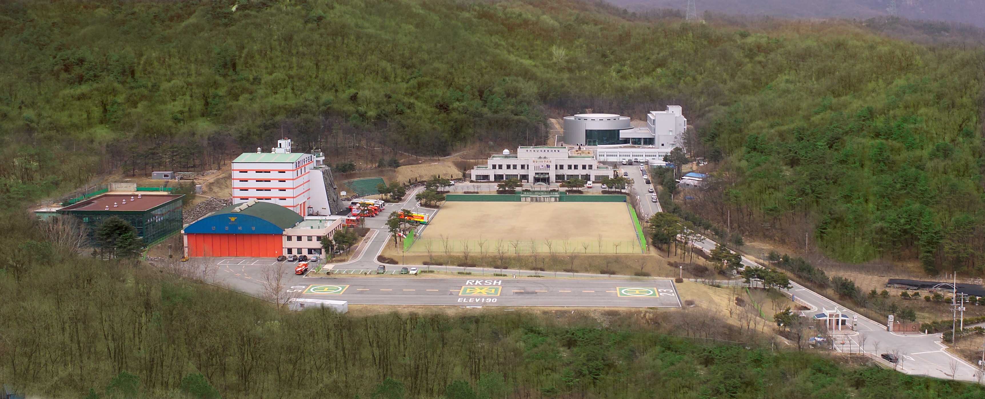 Photos by Korea Fire Service